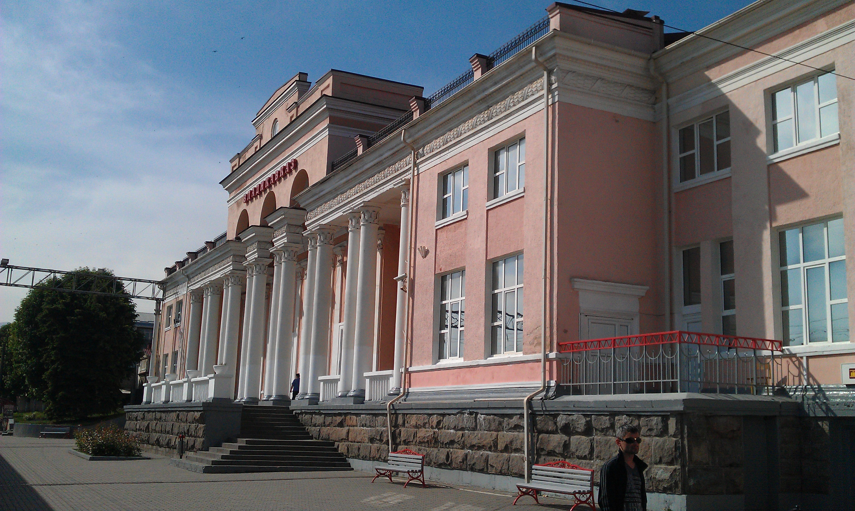 Вид со стороны перрона